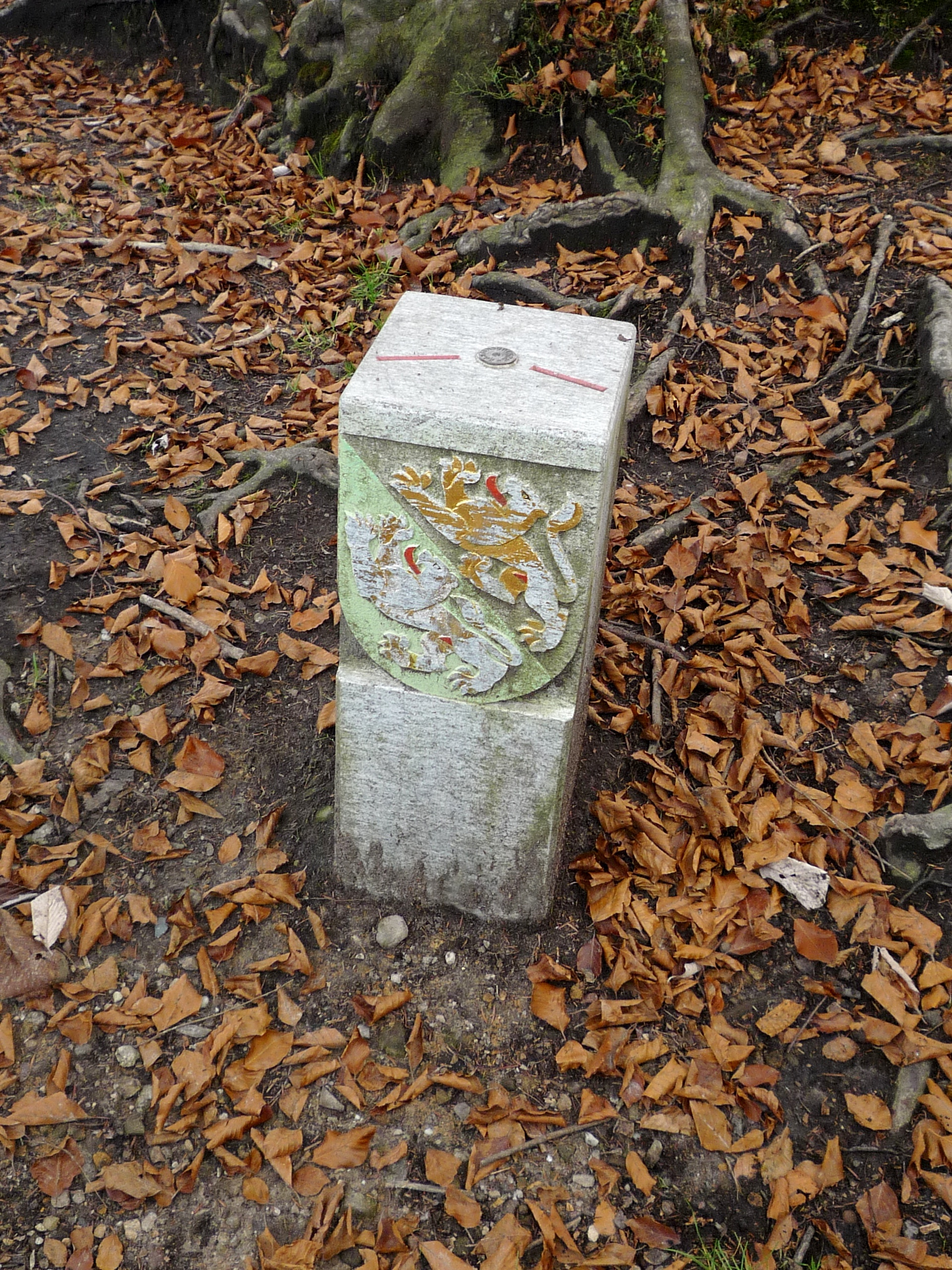 Höchter Punkt (991 m) des Kantons Thurgau; die roten Linien auf dem Stein kennzeichnen den Verlauf der Kantonsgrenze